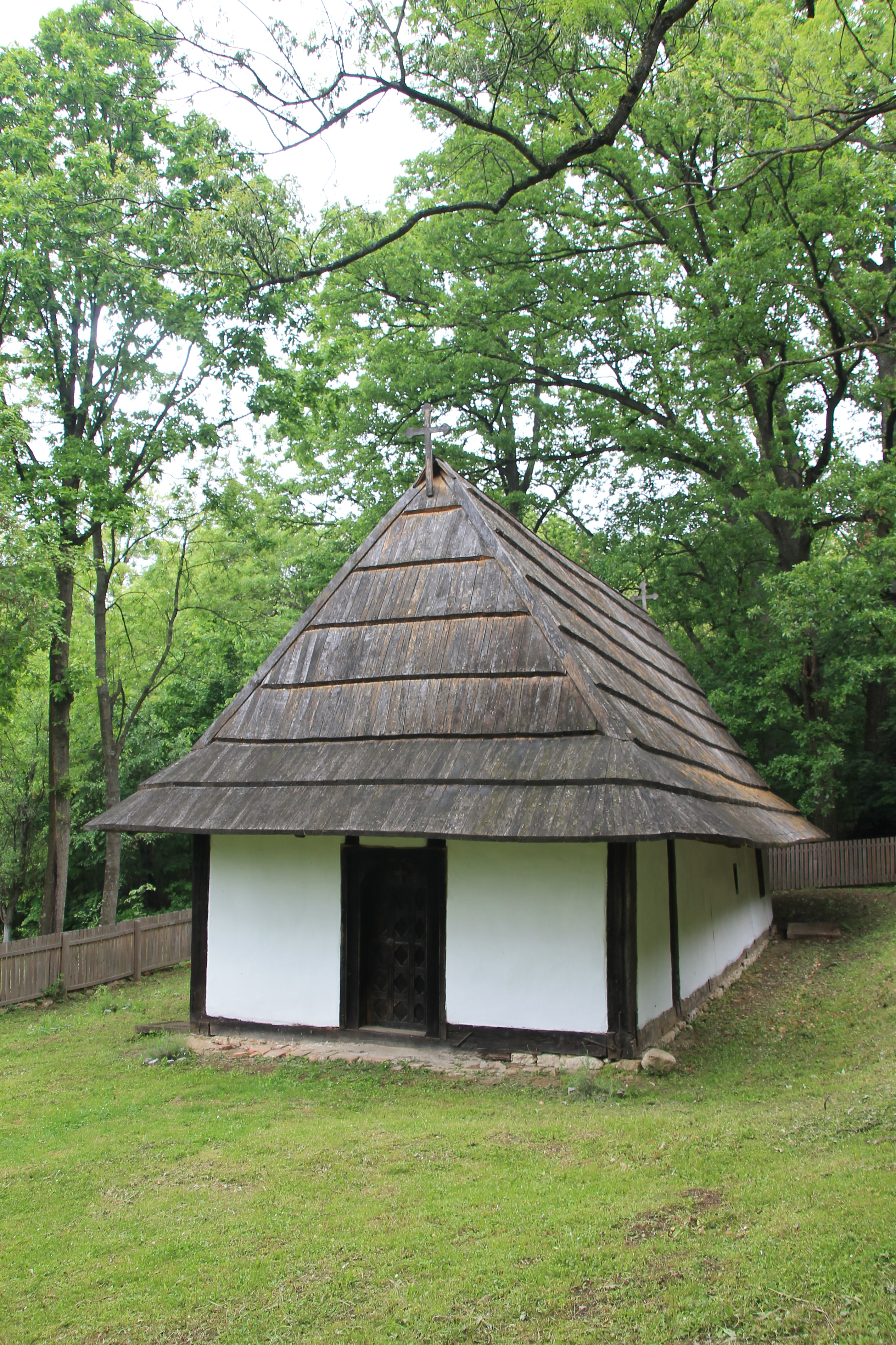 Crkva brvnara (Pavlovac)